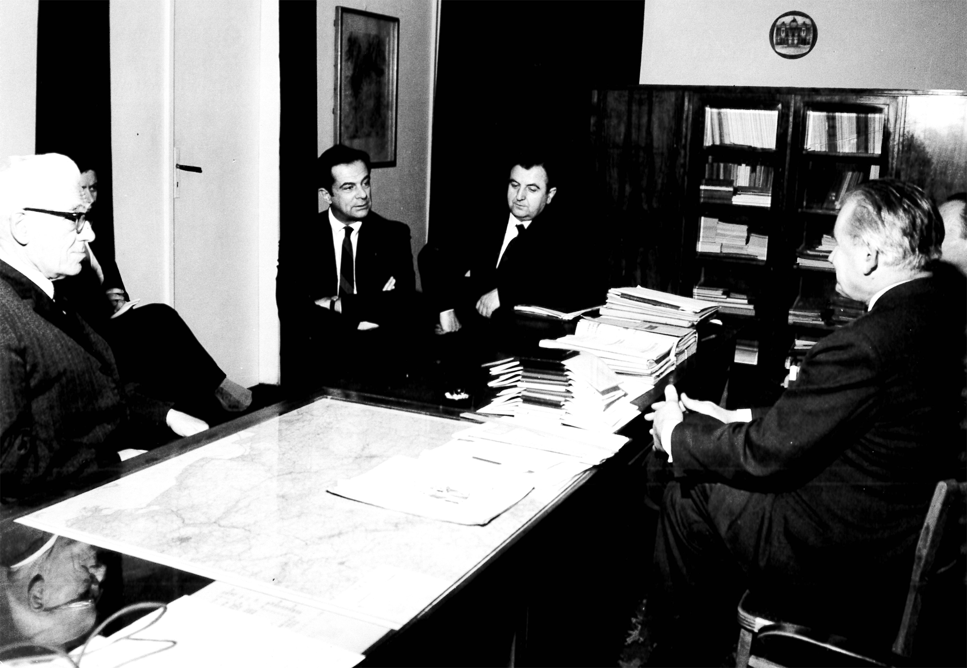 Od lewej Pułkownik Janusz Podgórski, J.J.Więckowski (wice-prezes Girard Trust Foundation z Filadelfii, USA), Płk. Zdzisław Ciesiołkiewicz, i inni, w kwietniu 1971 na rozmowach w Politechnice Warszawskiej z Rektorem Mieczysławem Łubińskim. English Translation- from the left, Colonel Janusz Podgórski, J.J.Więckowski (vice-president of the Girard Trust Foundation in Philadelphia, USA), Col. Zdzisław Ciesiołkiewicz, and others in talks with Chancellor Mieczysław Łubiński of the Warsaw University of Technology, April 1971.